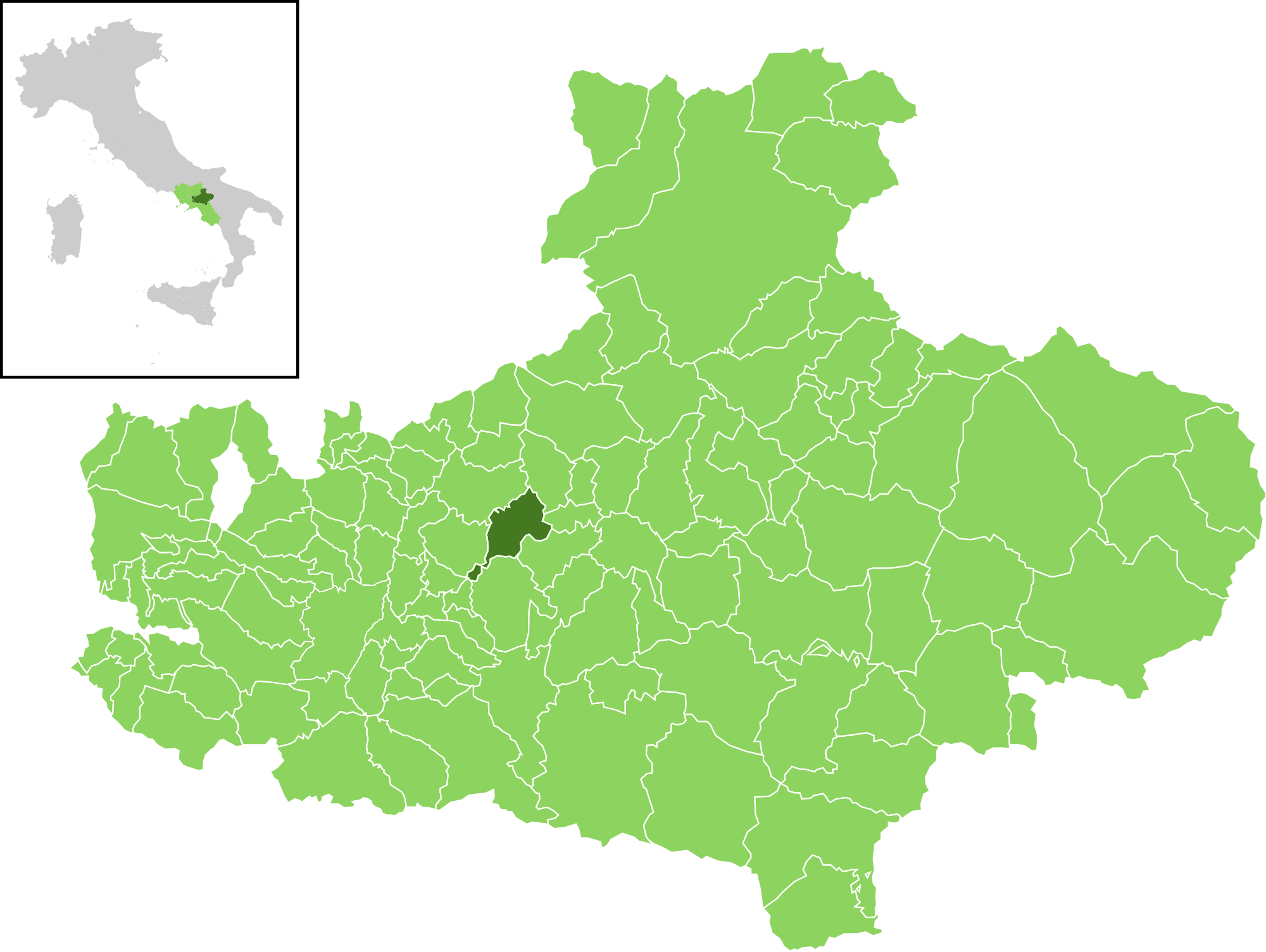 Il comune all'interno della provincia di Avellino